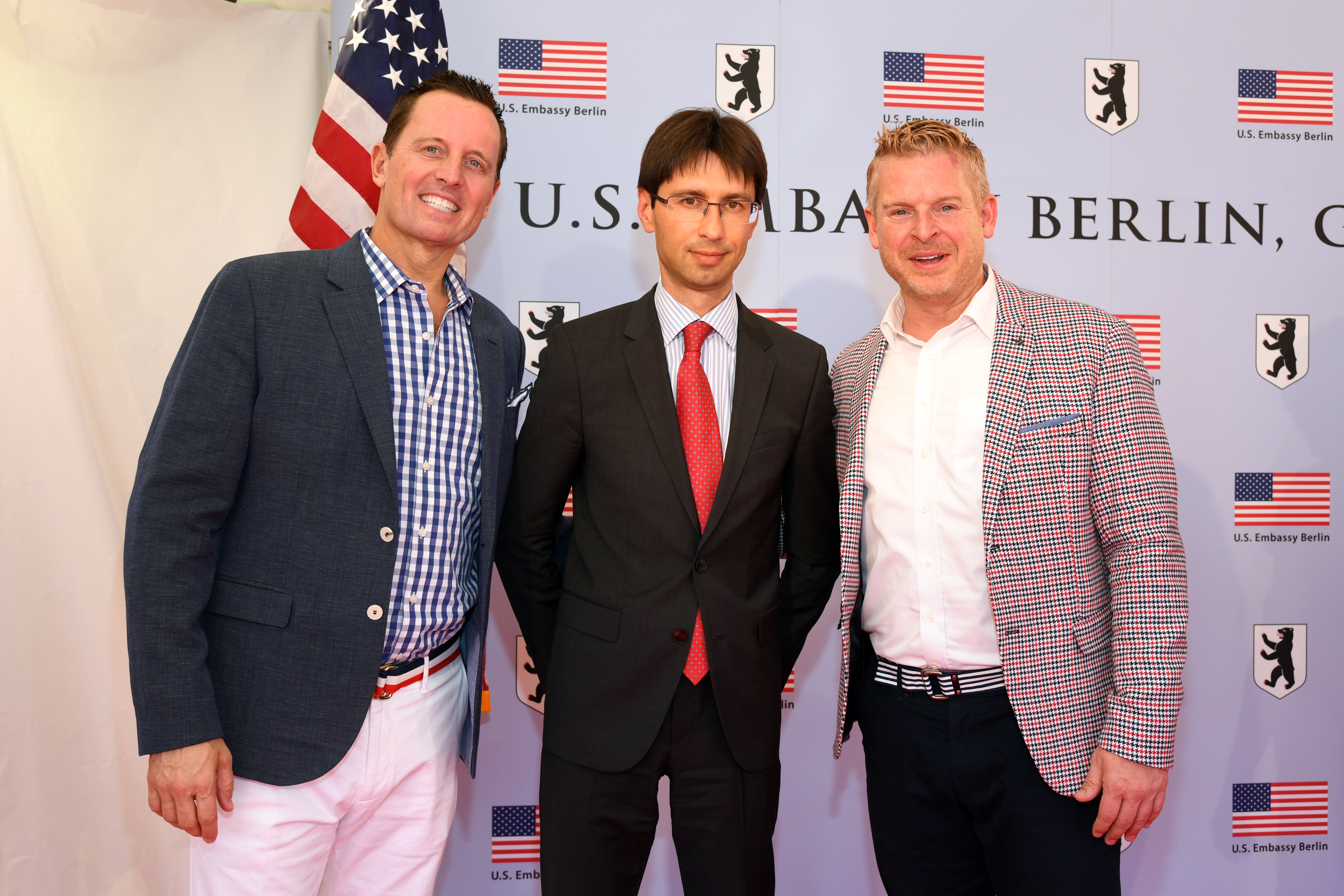 Richard Grenell, Denis Sidorenko & Matt Lashey, Sommerfest der US Botschaft Berlin, 4th of July 2018